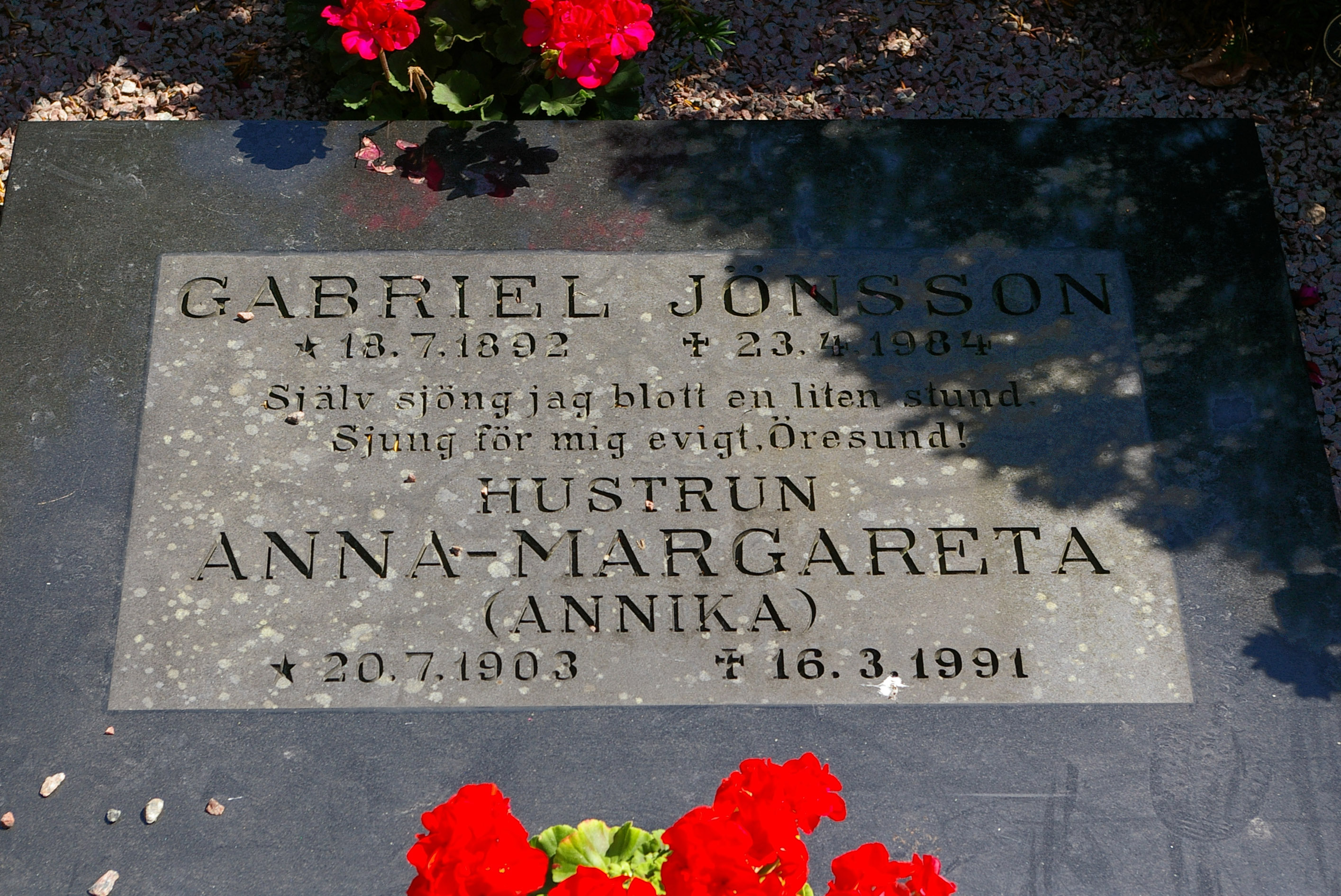 Diktaren Gabriel Jönssons gravsten på Glumslövs kyrkogård i Skåne, Sverige.